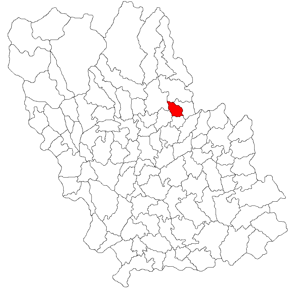 Categorie:Hărţi ale judeţului Prahova